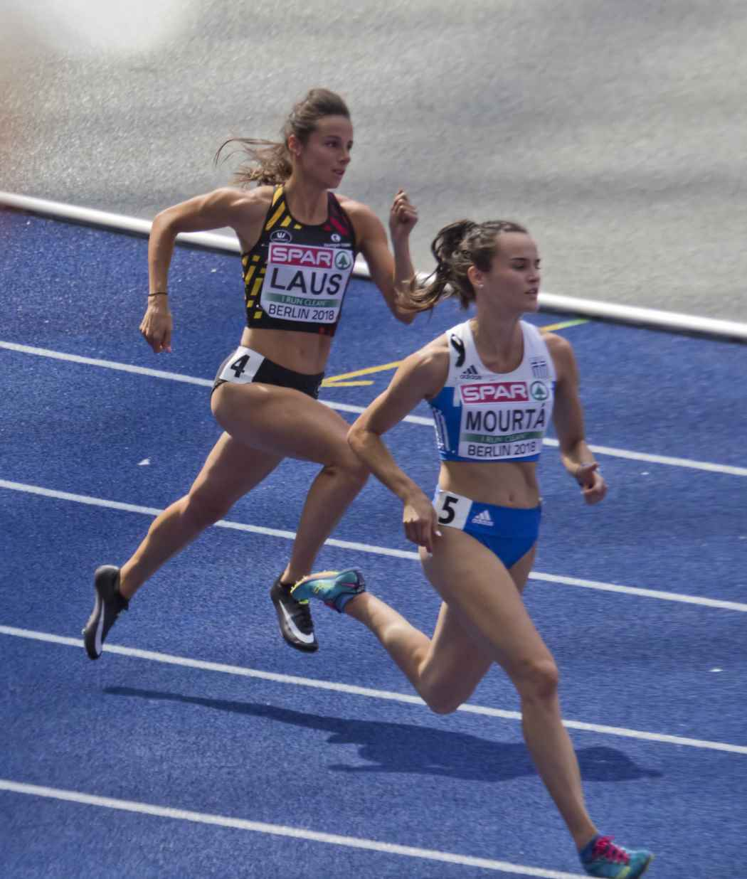 EKB21118 laus